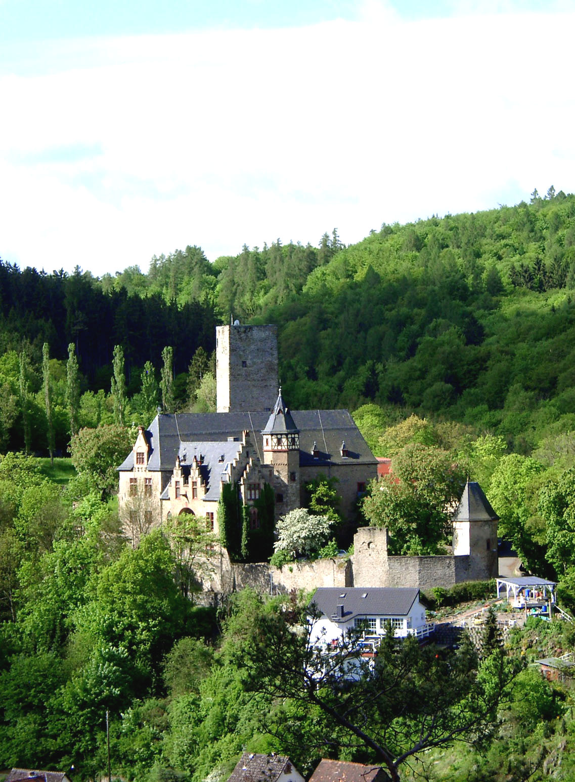 Schloss Kransberg Totale